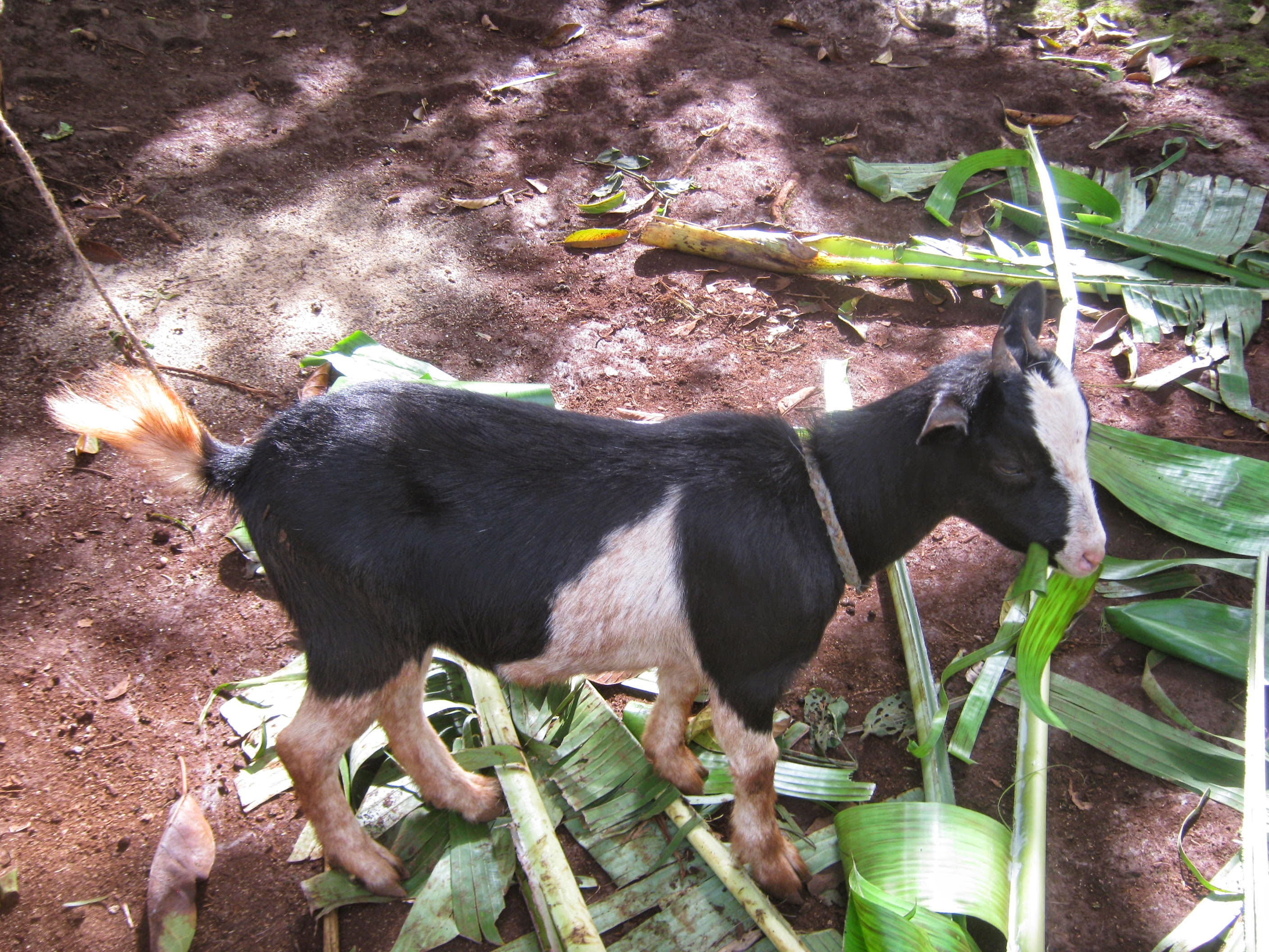 Chèvre